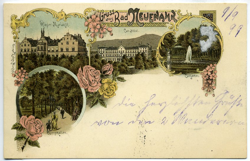 Bad Neuenahr 1899--- Kloster Mariahilf - Cur Hotel - Cur Garten - Wiezenallee